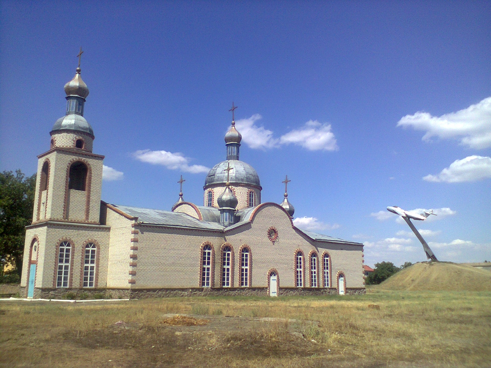 Центр с. Роздольного. Церковь и Памятник.